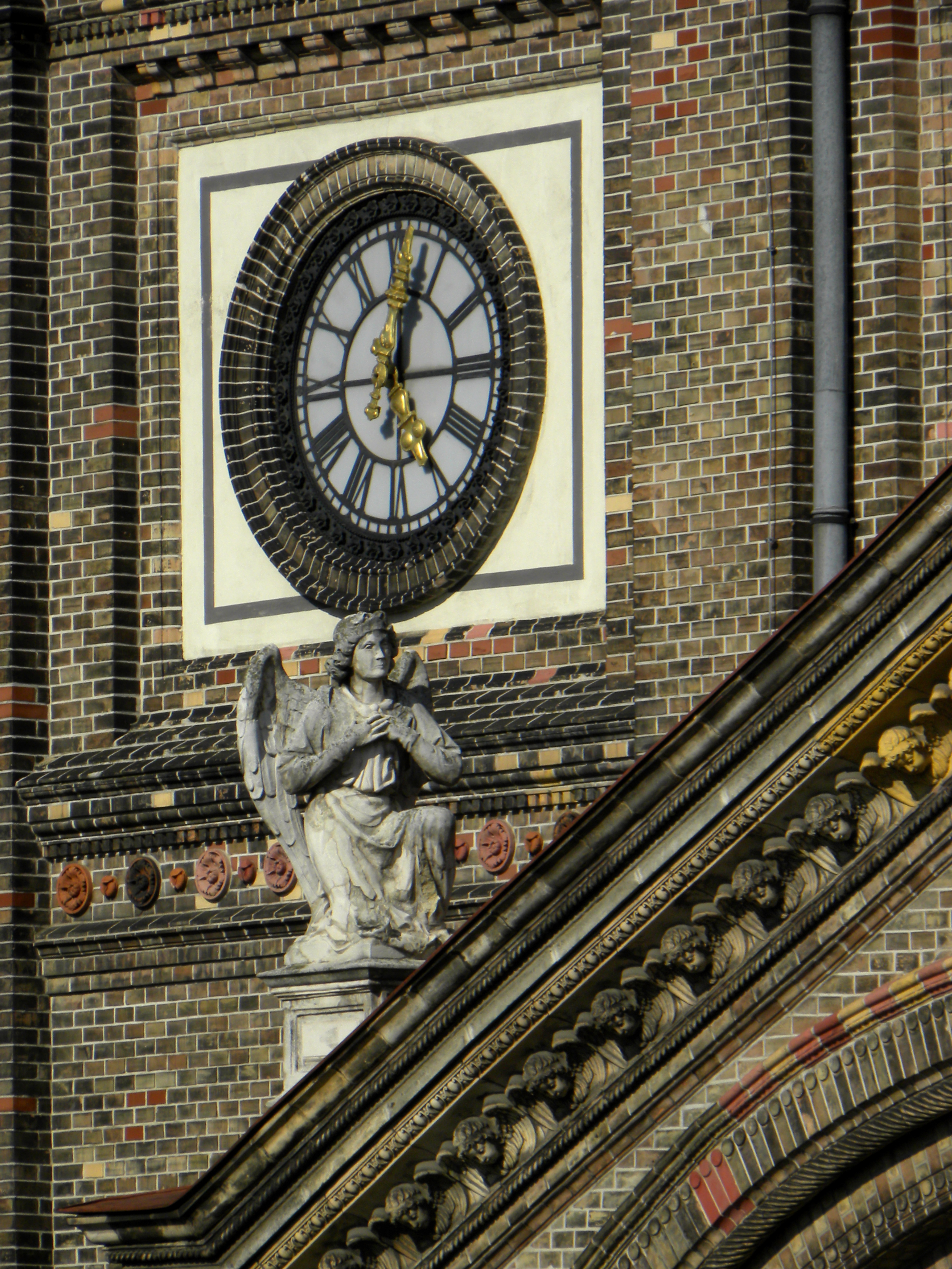 Kath. Pfarrkirche, Breitenfelder Pfarrkirche hl. Franziskus Seraphicus